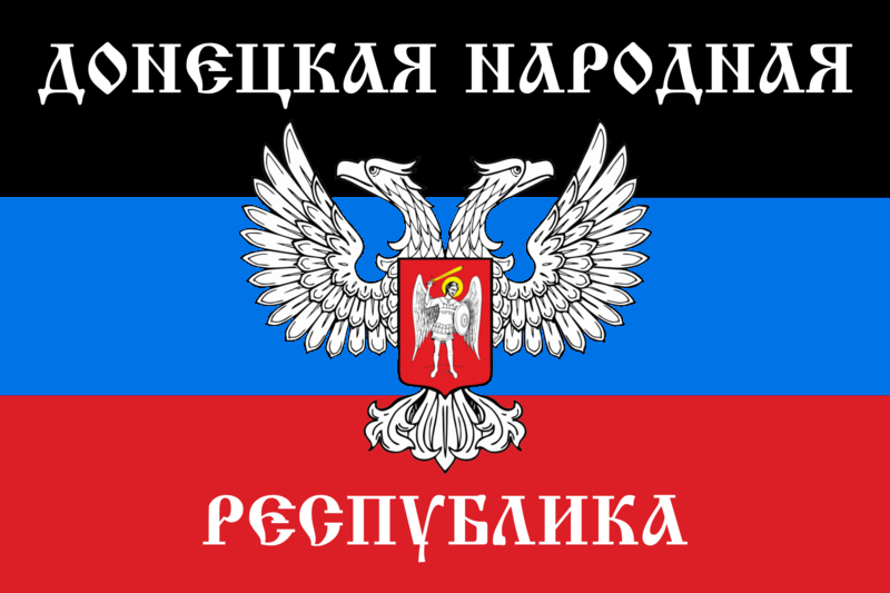 Флаг Донецкой Народной Республики